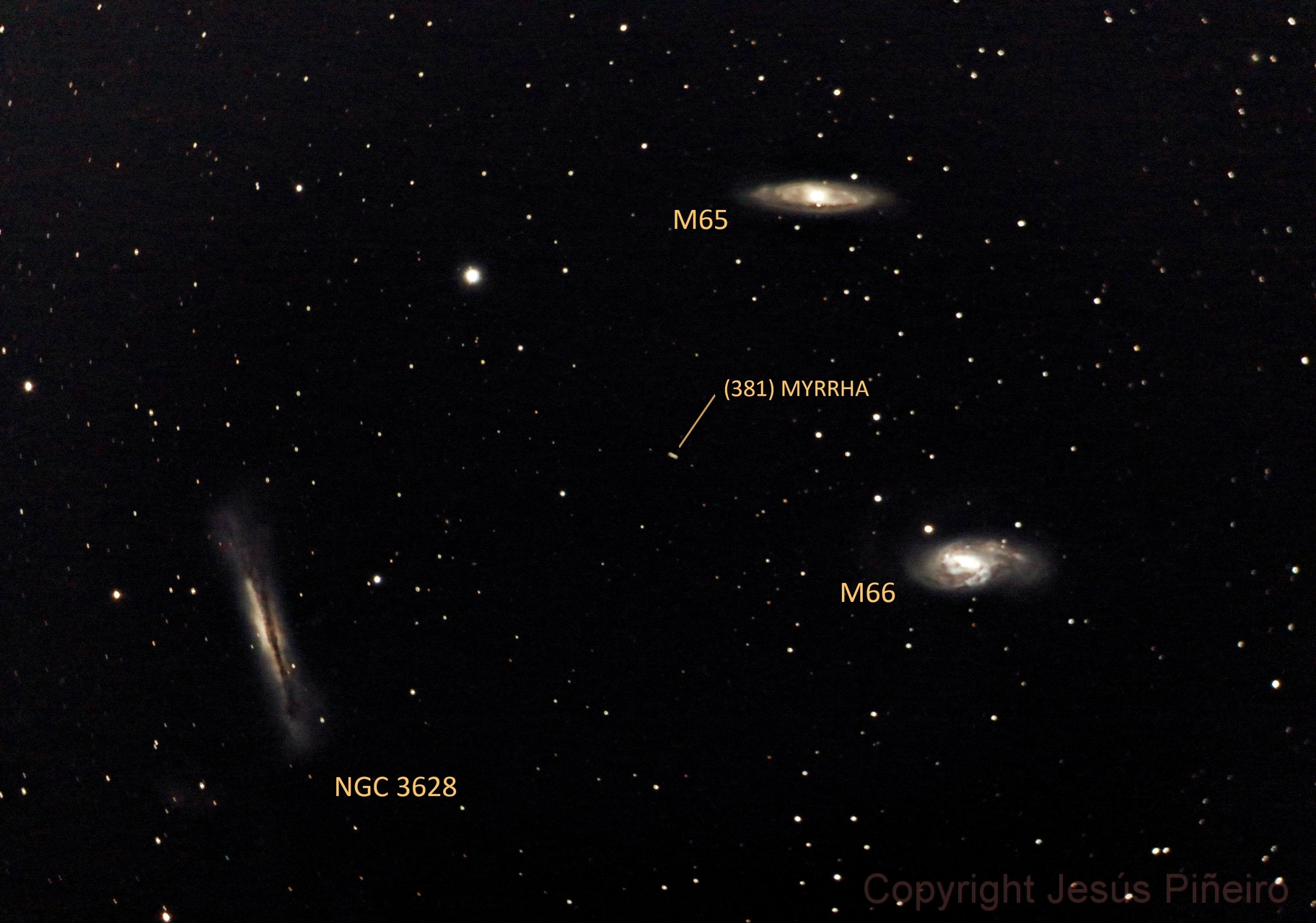 El asteróide (381) Myrra cruzando el campo del Triplete de Leo ( Messier 65, Messier 66 y NGC 3628) Telescopio u objetivo: Meade SC 10" f6.3 Cámara fotográfica: Canon EOS 50D Montura: Home made with Byers 7.5" drive Reductor de focal: Meade f/6.3 FR/FF Fechas: 25 de Enero de 2015 Tomas: 16x240"